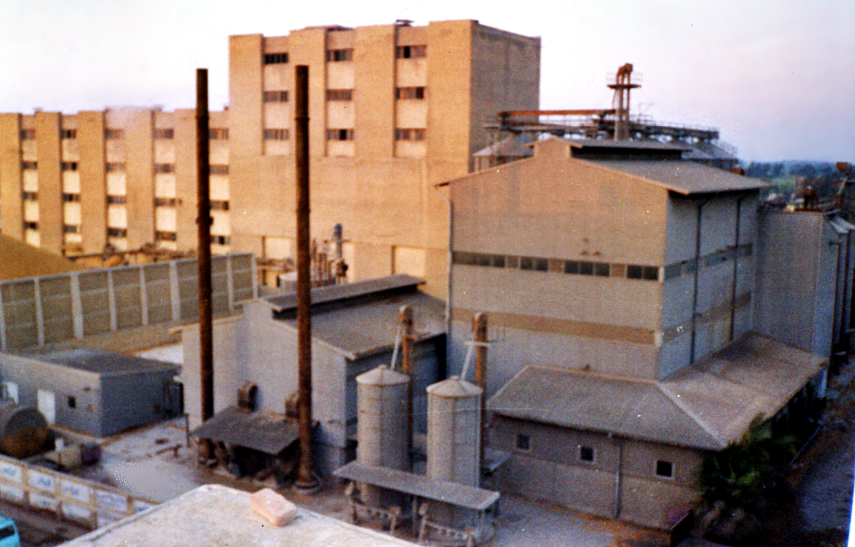 شركة مضارب كفر الشيخ بمدينة دسوق، مصر